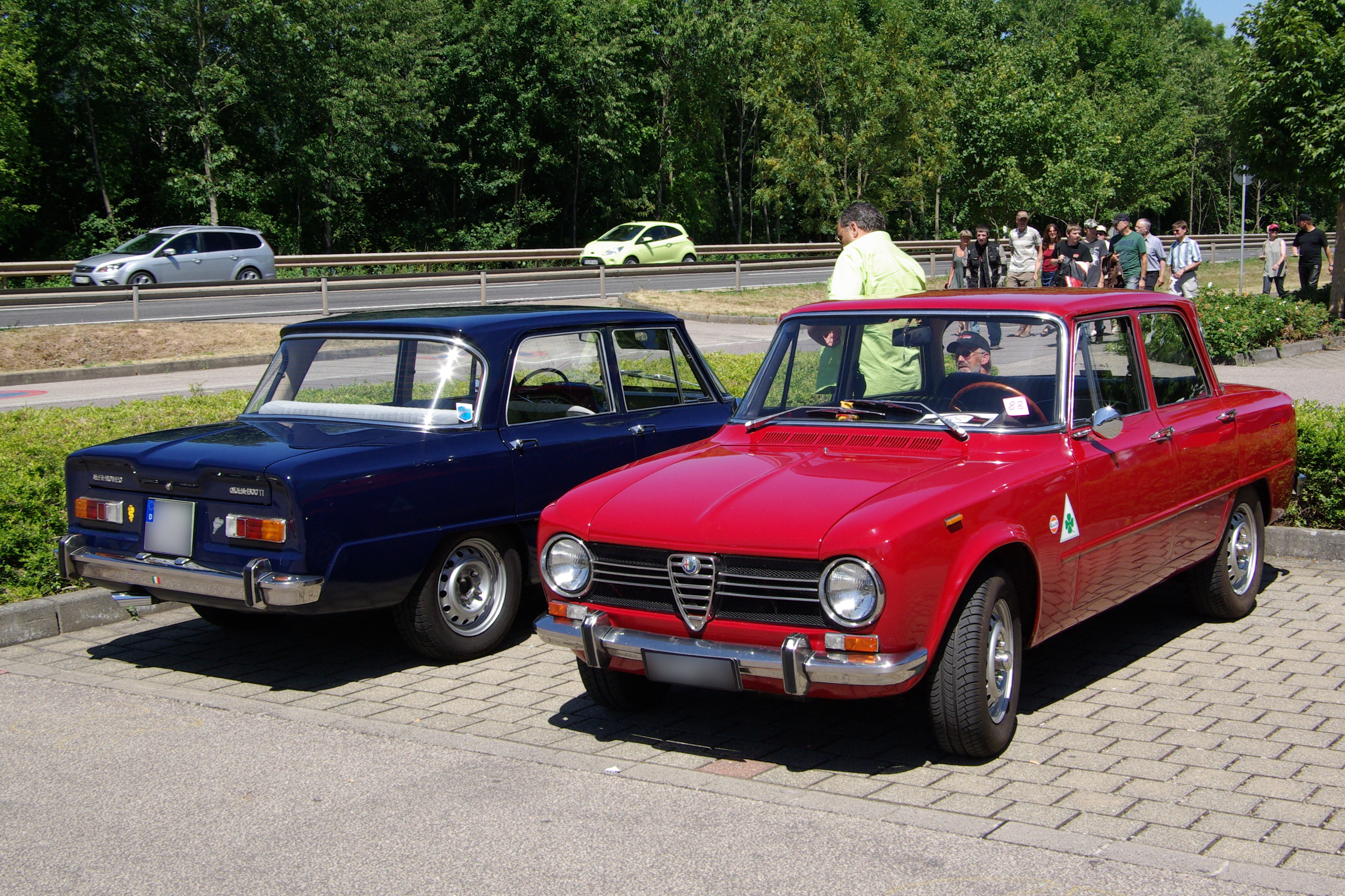 Alfa Romeo Giulia der Rote ist Baujahr 1971, 89PS aufgenommen bei / photographed at "Internationales Konzer Oldtimer-Treffen", 18. Juli 2010